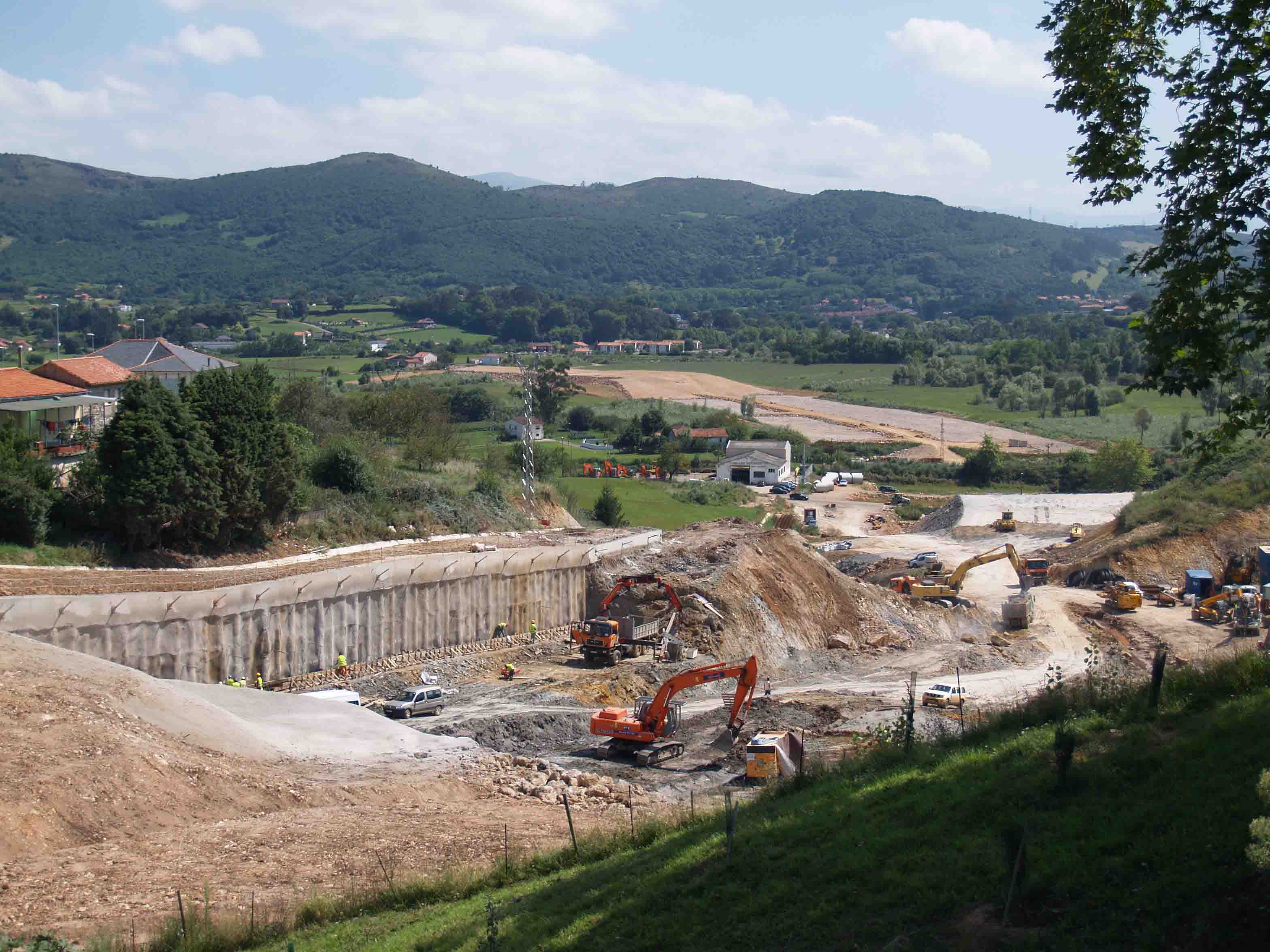 Construcción de la autovía "Ronda Bahía" a su paso por Guarnizo (salida del Túnel de la Morcilla por la boca sur)